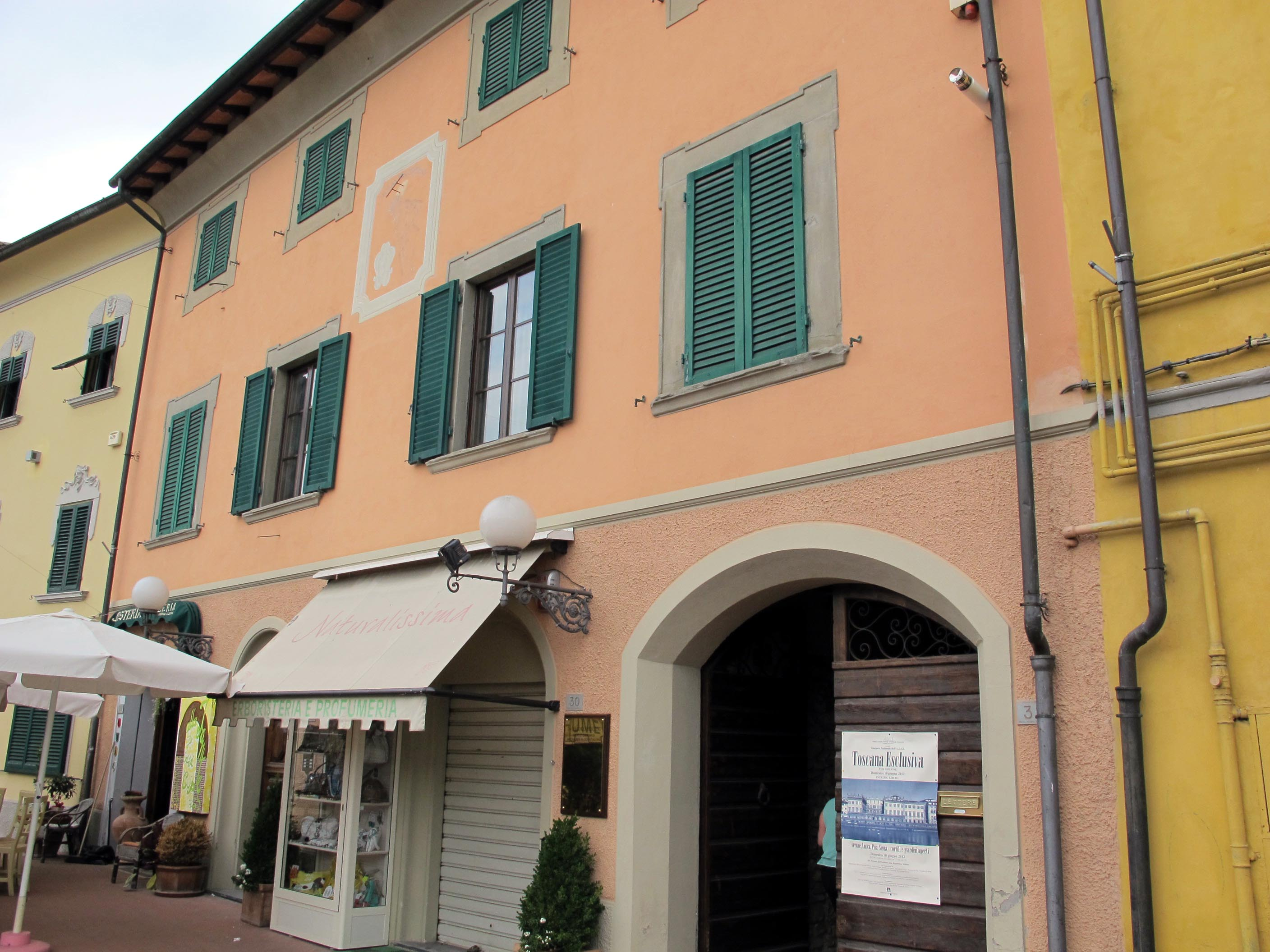 Bientina, palazzo pancani